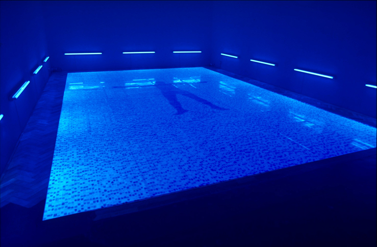 Instalación en el Museo de Arte Moderno de Bogotá